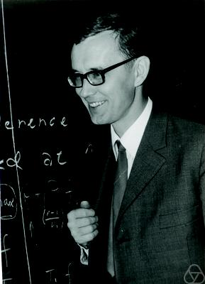 Foto di Petr Mandl